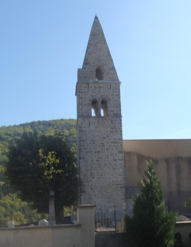 Le clocher de l'église de Rabou vu du nord. Clocher-tour rectangulaire en maçonnerie, accolé à l'abside.